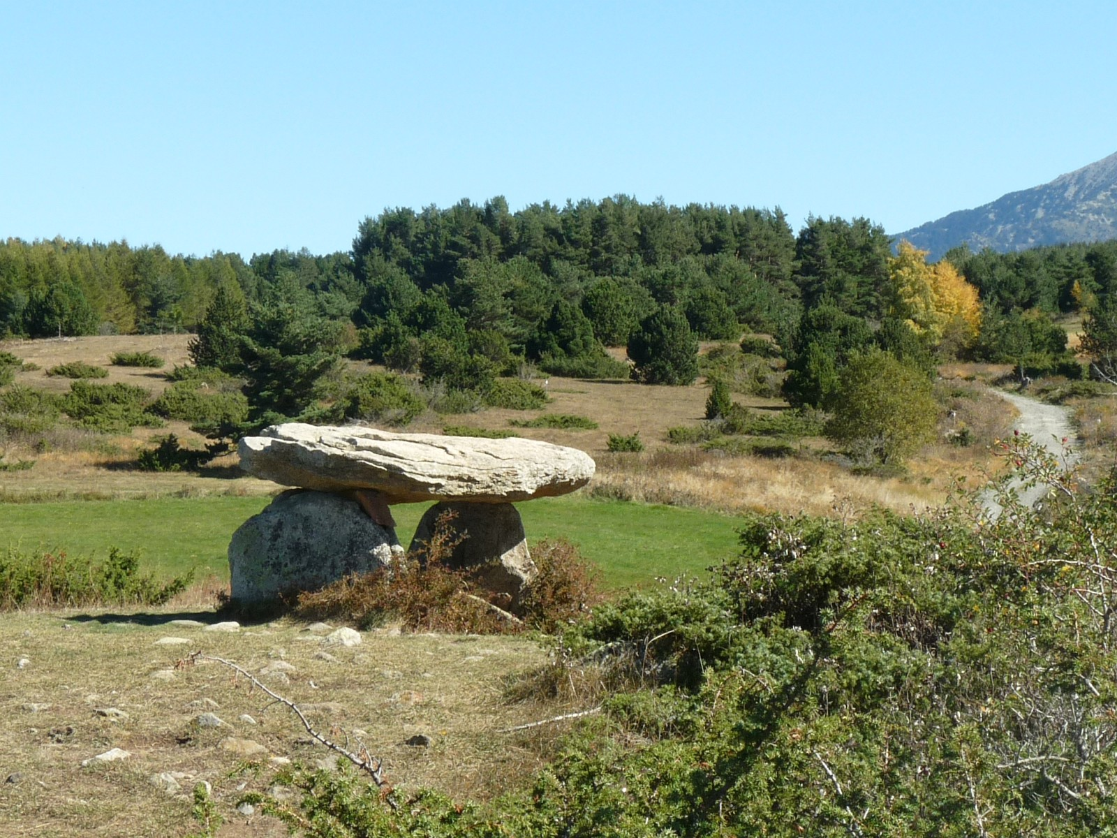 Dolmen d'Eyne, Pyrénées-Orientales, France